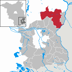 Schenkendöbern in Brandenburg (Country) - District Spree-Neiße